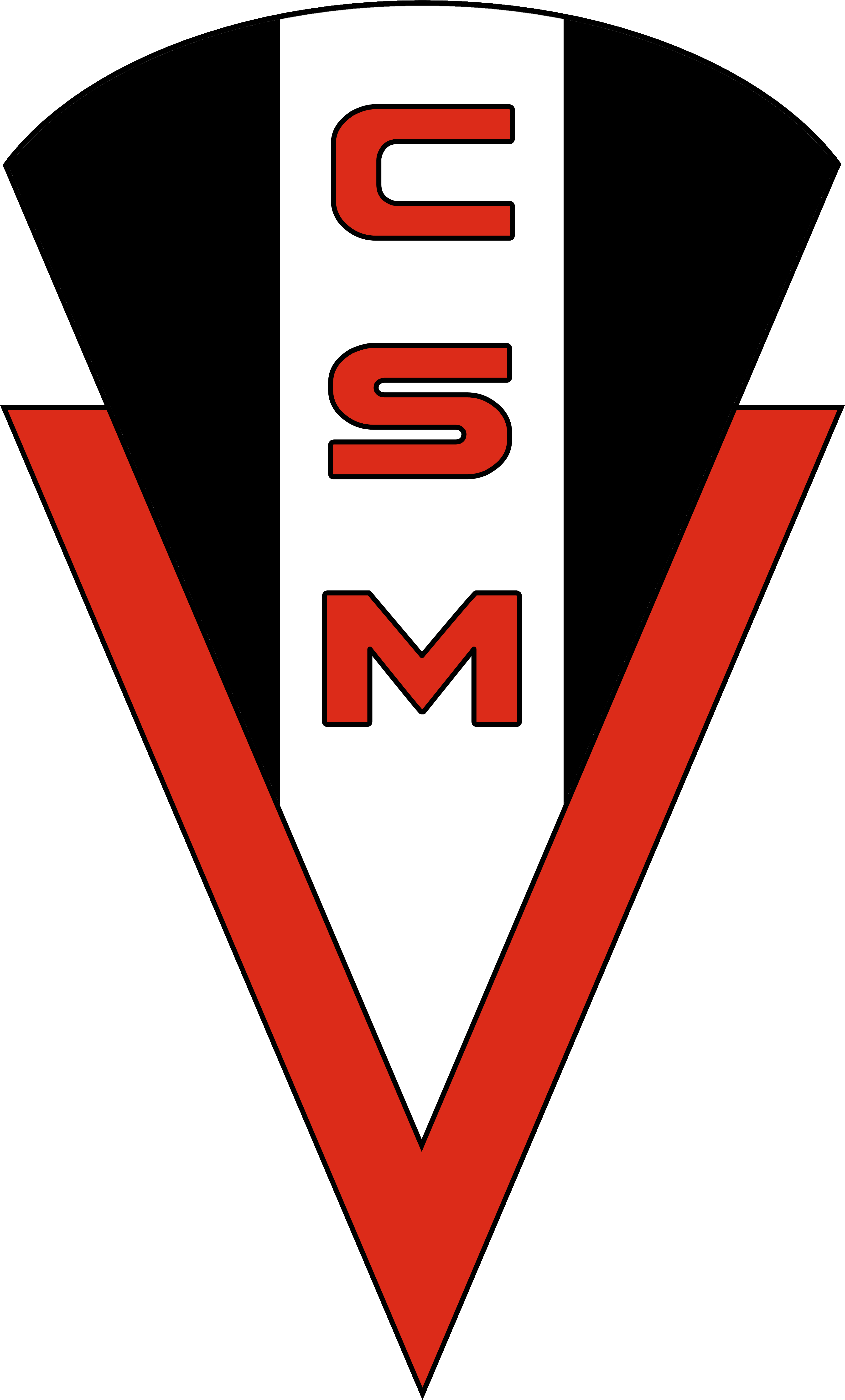 Escudo del Club Sportivo Miramar